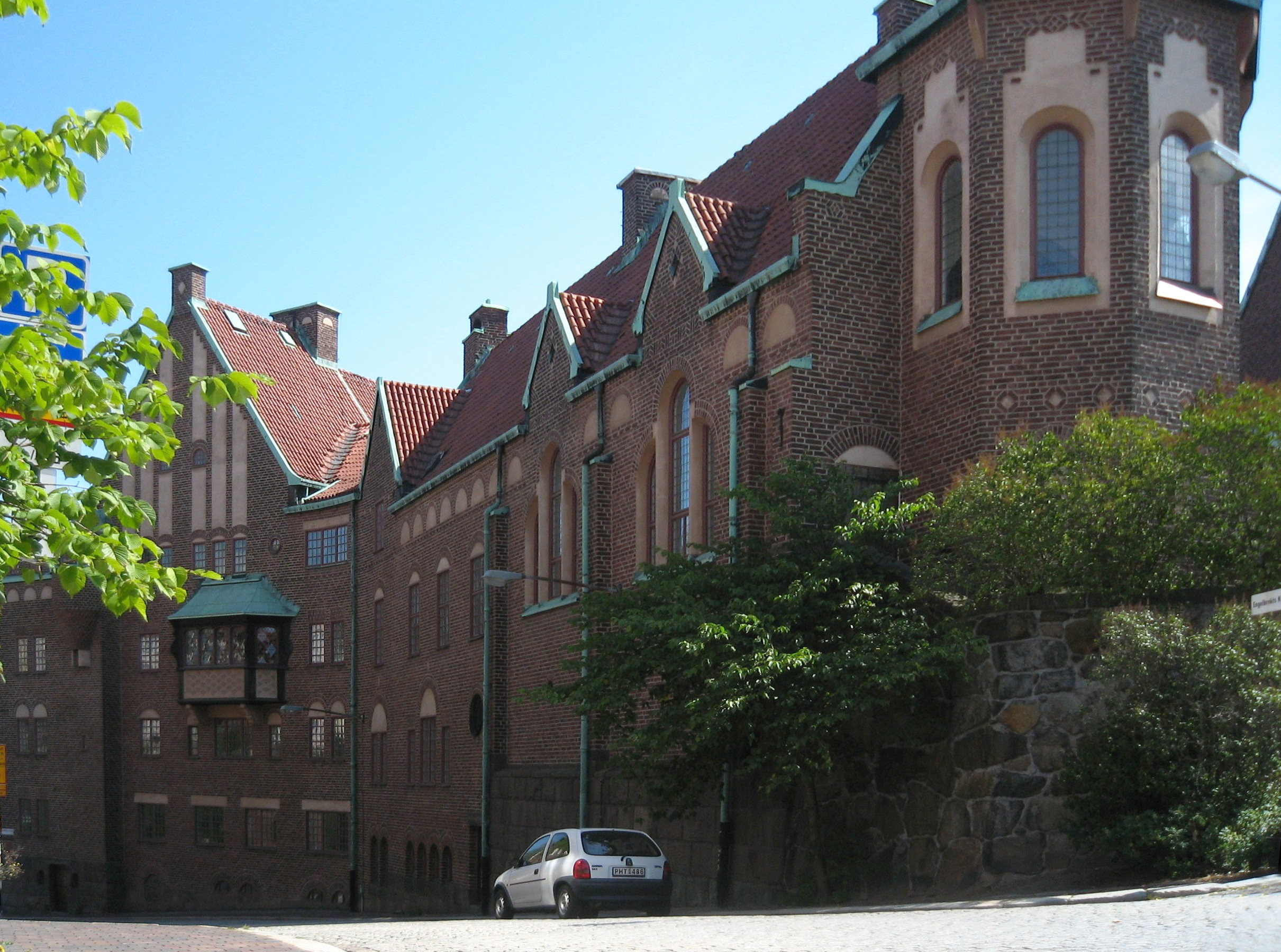 Lärkstaden, Stockholm